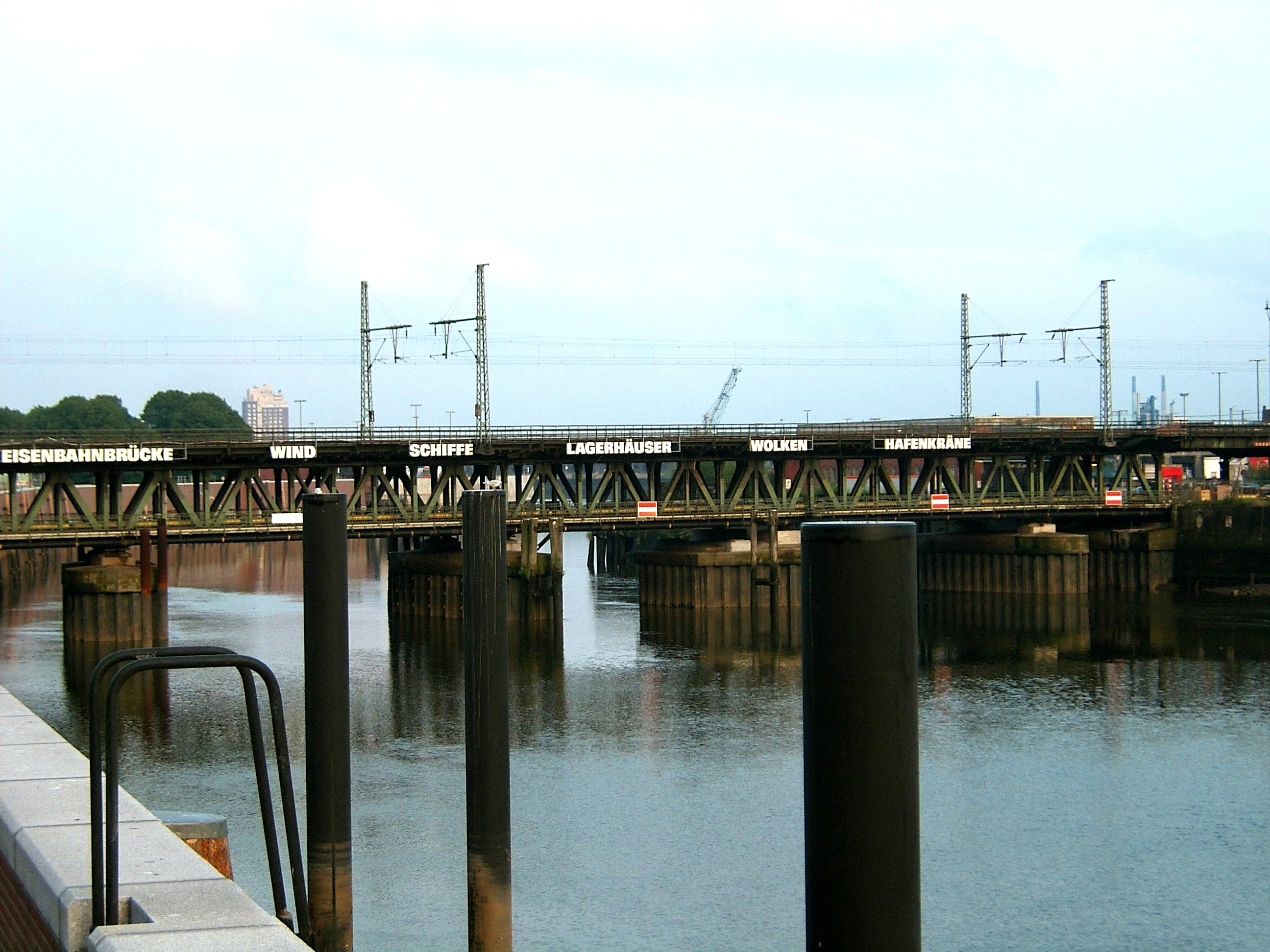 Die Oberhafenbrücke in Klostertor wurde 1902 bis 1904 als doppelstöckige ursprünglich drehbare Brücke zum Hafen hin erbaut. Die obere Ebene wird von der Eisenbahn, die untere vom Straßenverkehr genutzt.